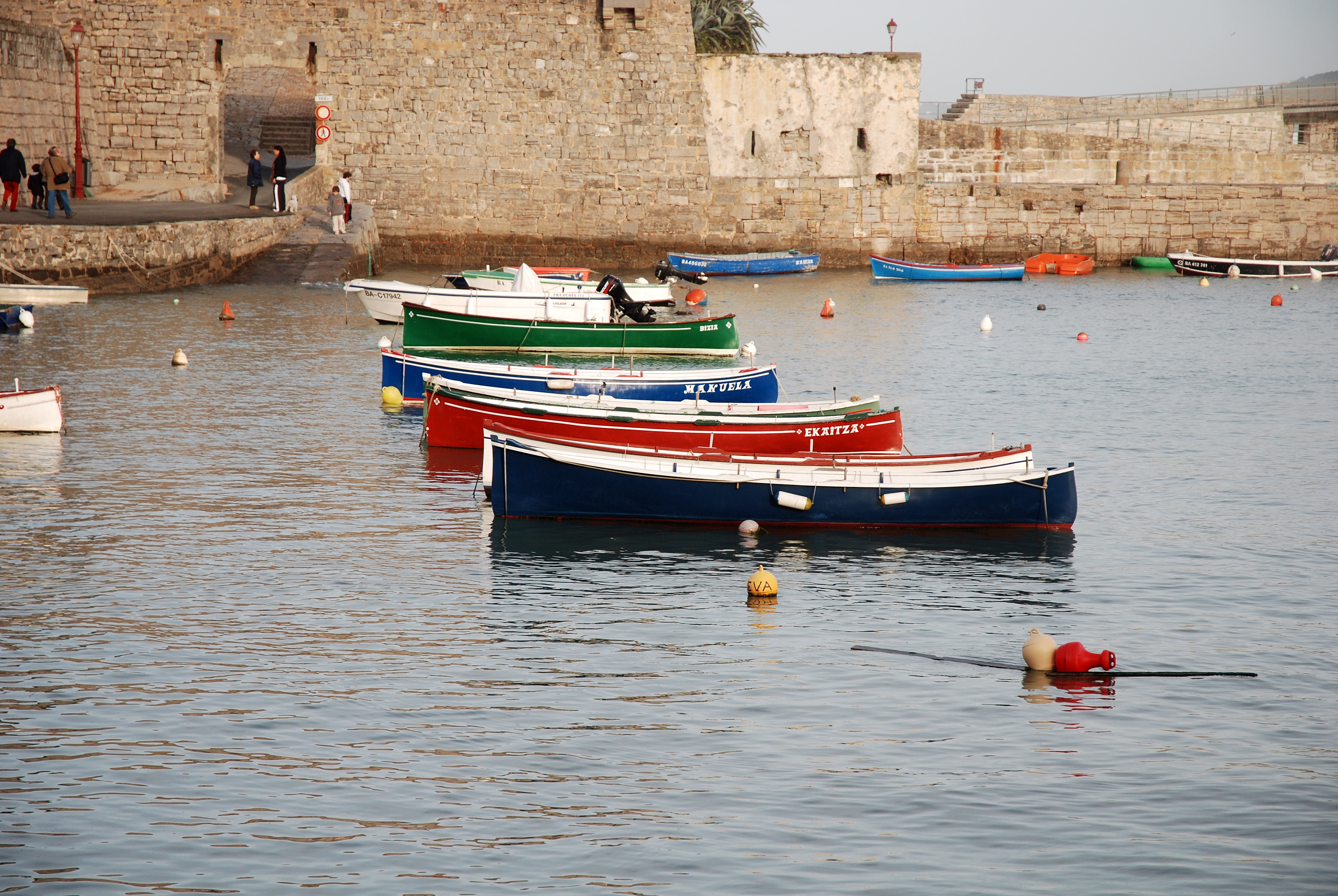 Trainières dans le port de Socoa. Photo prise le 03/01/07 par Harrieta171